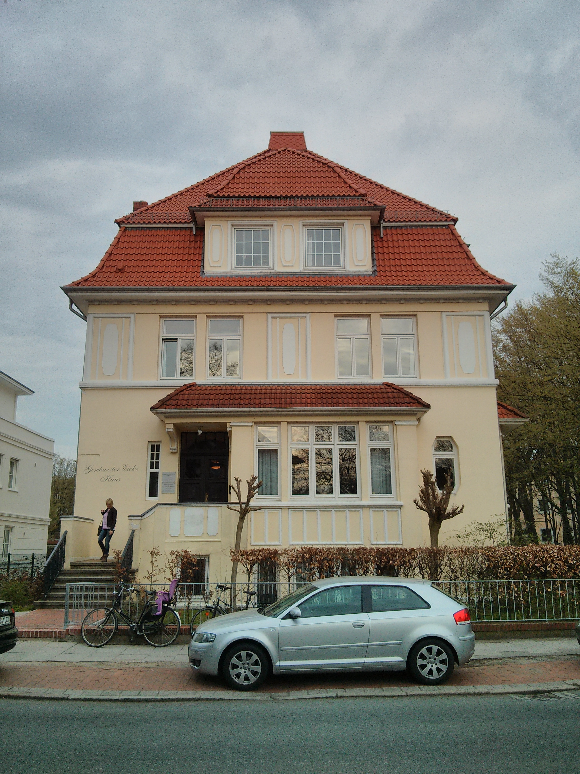 Haus Meyer, Waldorfschule in Bremen, Metzer Straße 30 Das abgebildete Objekt ist ein geschütztes Kulturdenkmal in der Freien Hansestadt Bremen, mit der Nr. 0928 beim Landesamt für Denkmalpflege registriert.